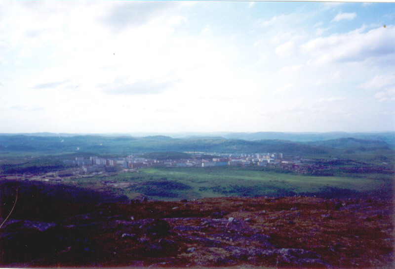 Город Заозерск. Вид с Бегемота.